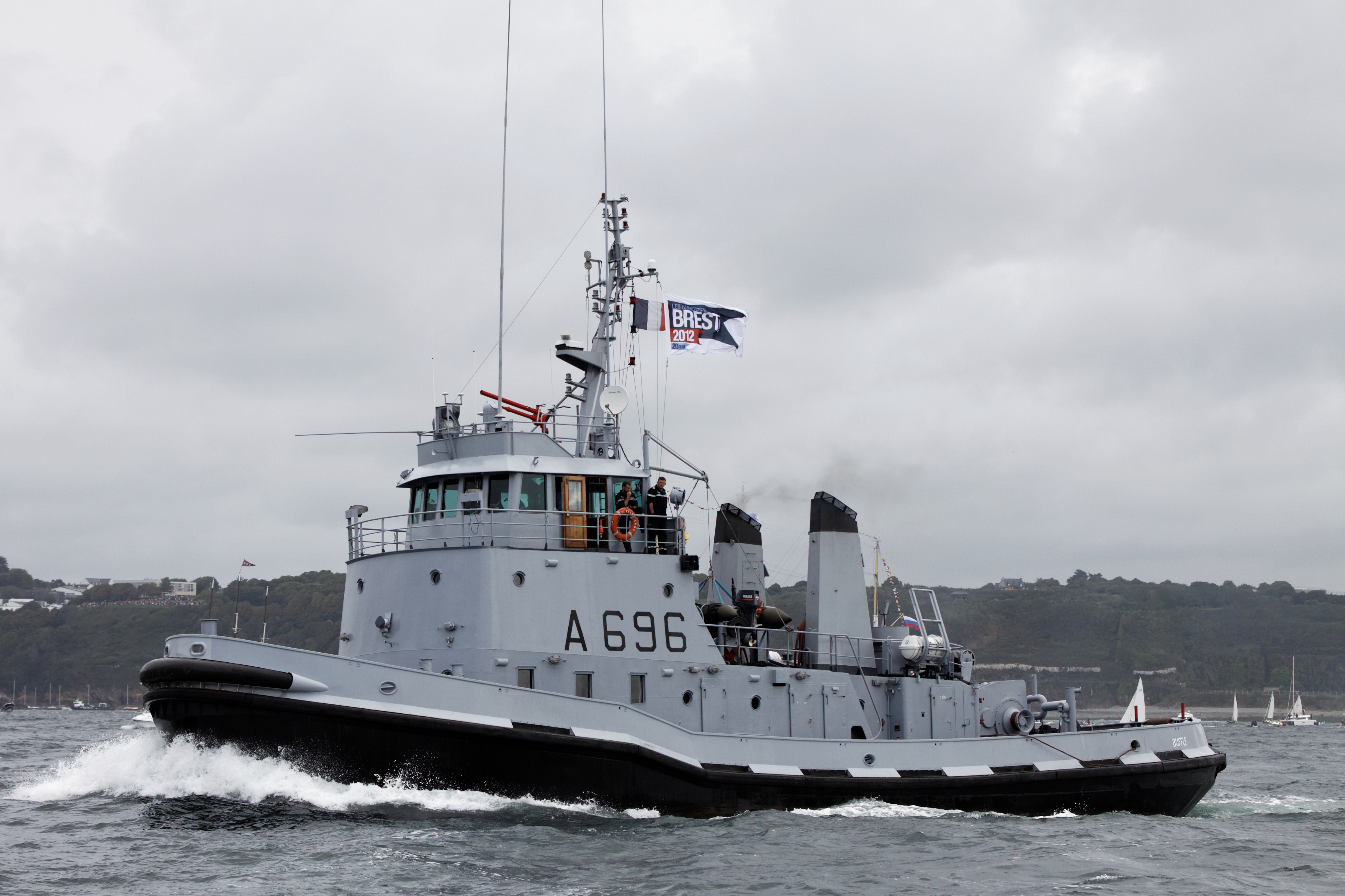 Le Buffle lors de la grande parade des Tonnerres de Brest 2012 dans la rade de Brest en direction de Douarnenez.